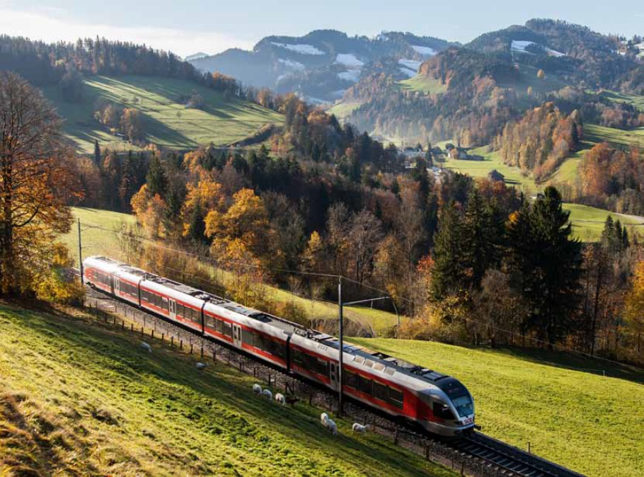 RABe 526 der Südostbahn zwischen Mogelsberg und Brunnadern-Neckertal